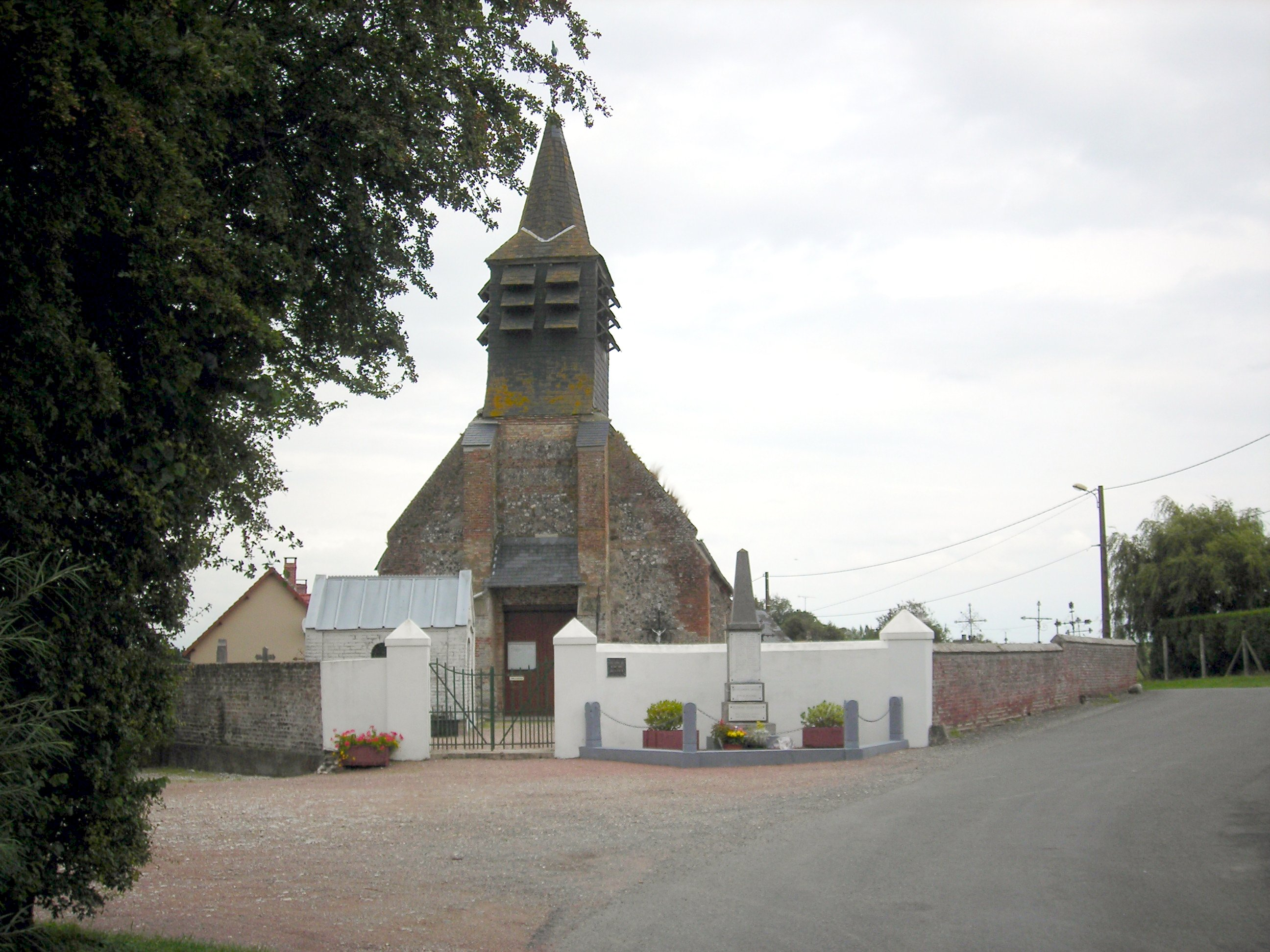 Brutelles (Somme), l'église de l'Assomption-de-la-Vierge.